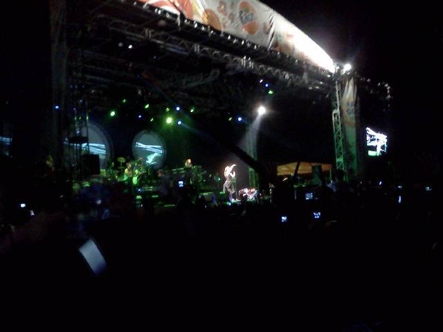 Şebnem Ferah sahnede, Fanta Gençlik Festivali konseri turnesi, Adana.